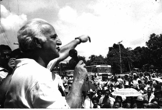 Raimundo Antonio da Costa Jinkings discursa em ato político na cidade de Paragominas, Pará